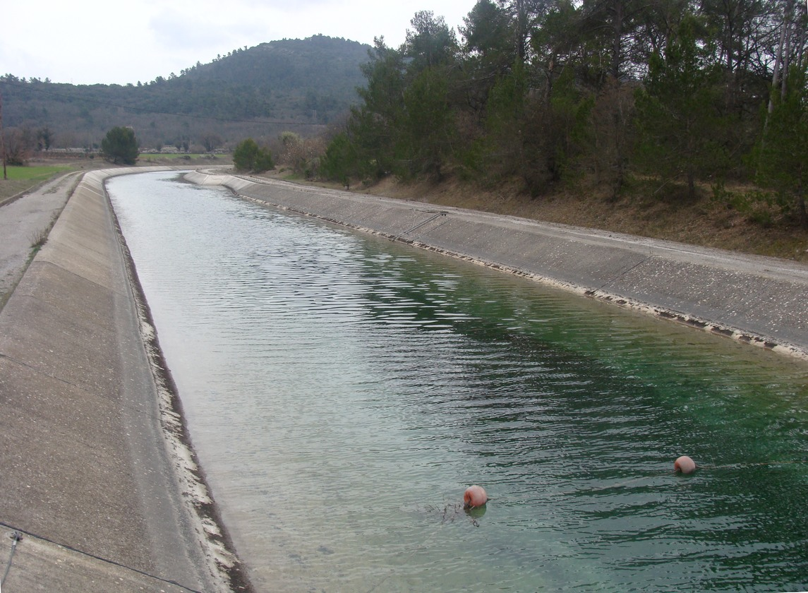 Le canal de Provence, branche du Var, près de Tourves (Var).